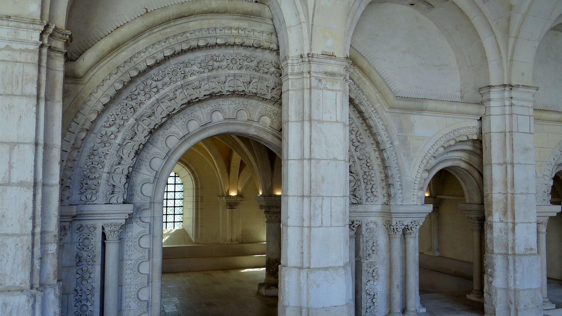 Entrée de la salle capitulaire, Abbaye Saint-Germain, Auxerre .